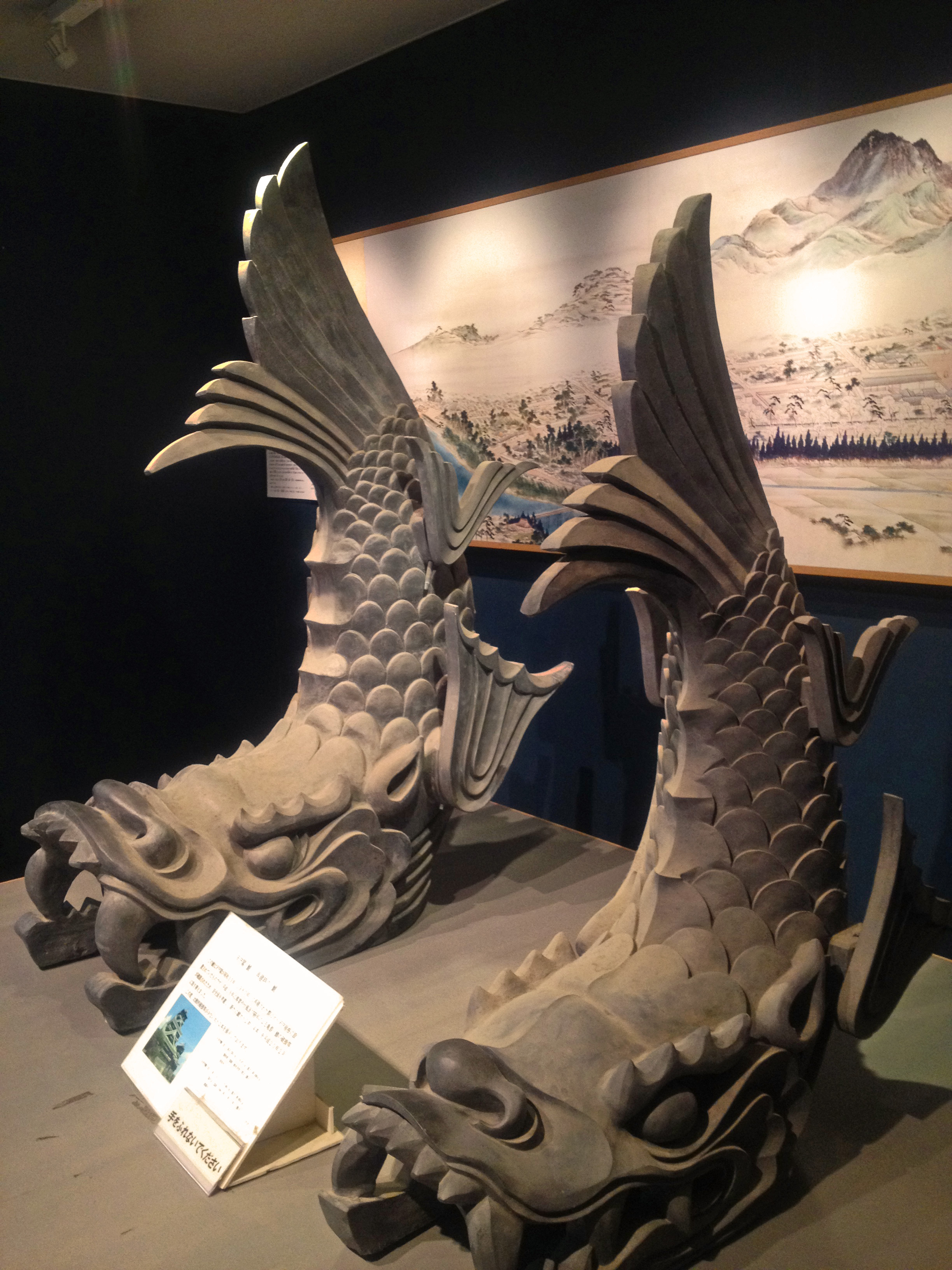 熊本城大天守内に展示されている熊本城大天守の鯱瓦。大天守棟上に上げられているものと同大のもの。